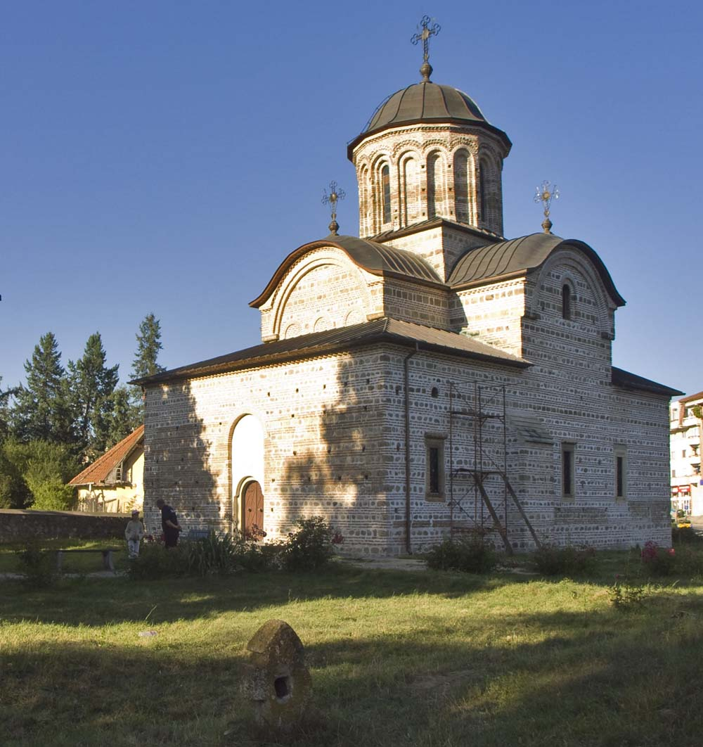 Curtea de Argeş, Biserica Domnească Sf. Nicolae Vedere din incintă. 01